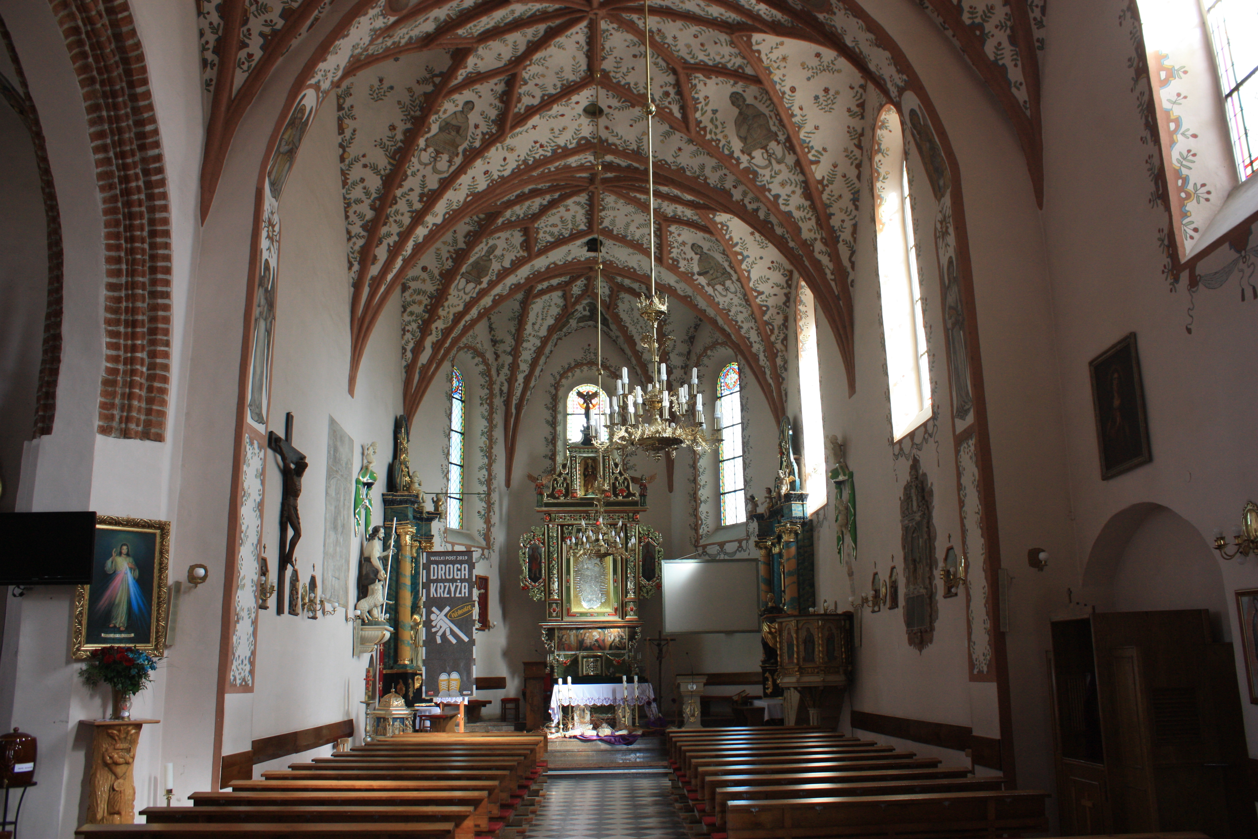 Kościół Narodzenia NMP w Kaźmierzu. Nawa główna i prezbiterium.